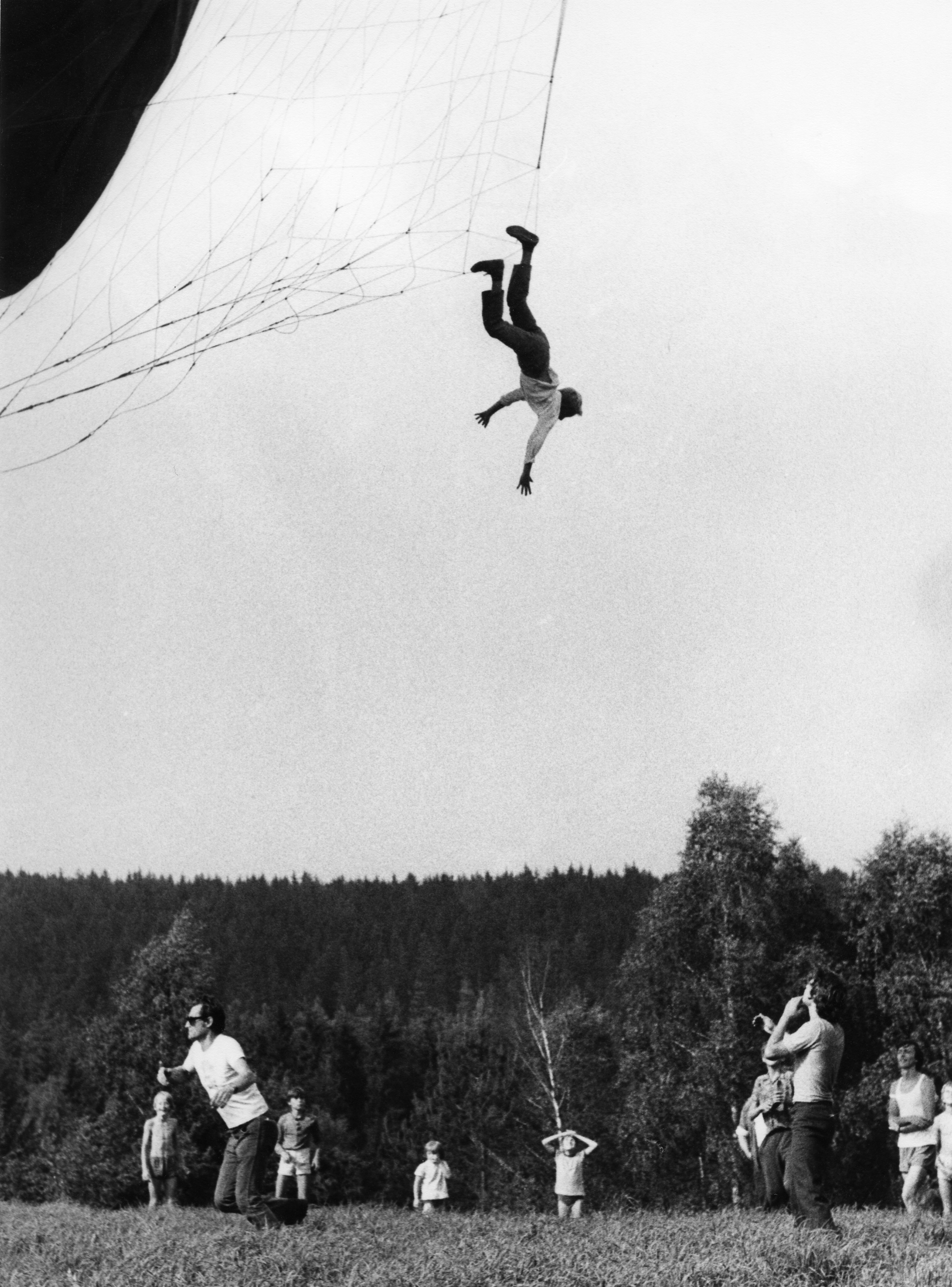 Snímek ze série "Pozor na balony!", která byla přijata na World Press Photo 1977 a byla celá otištěna v katalogu na dvou stránkách. Jako amatérovi mně tenkrát pomohl Antonín Bahenský ze Signálu, že jsem jejich spolupracovník. Název pro katalog byl v angličtině (Be awar of ballons!). Personality rights warningAlthough this work is freely licensed or in the public domain, the person(s) shown may have rights that legally restrict certain re-uses unless those depicted consent to such uses. In these cases, a model release or other evidence of consent could protect you from infringement claims.